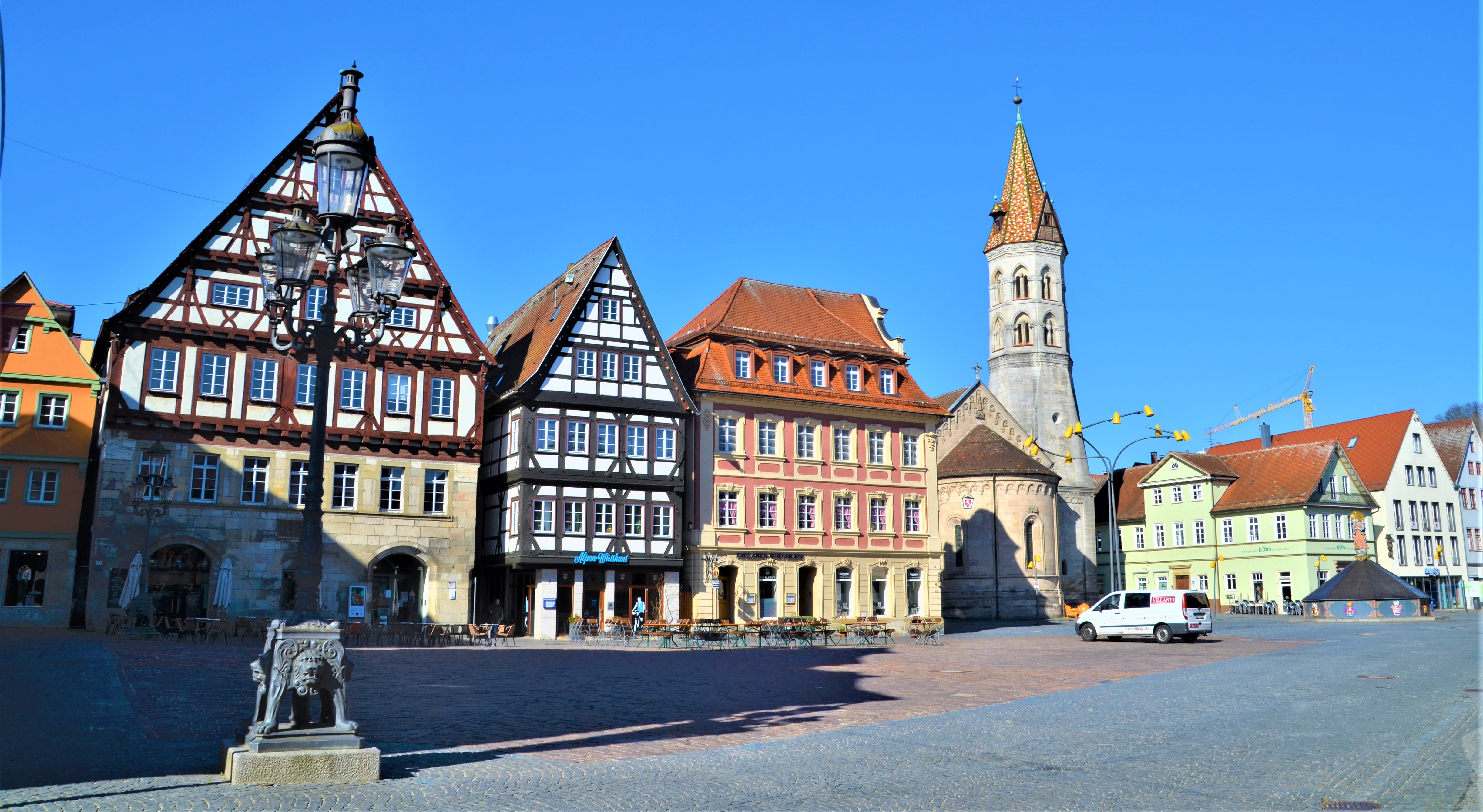 Die westliche Seite des Marktplatzes in Schwäbisch Gmünd, mit Grät, Haus tahl sowie Johanniskirche